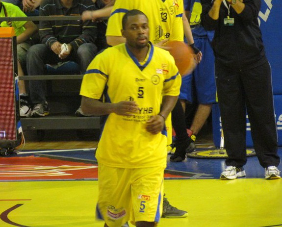 Oliver Lafayette In Maccabi Ashdod (2011)